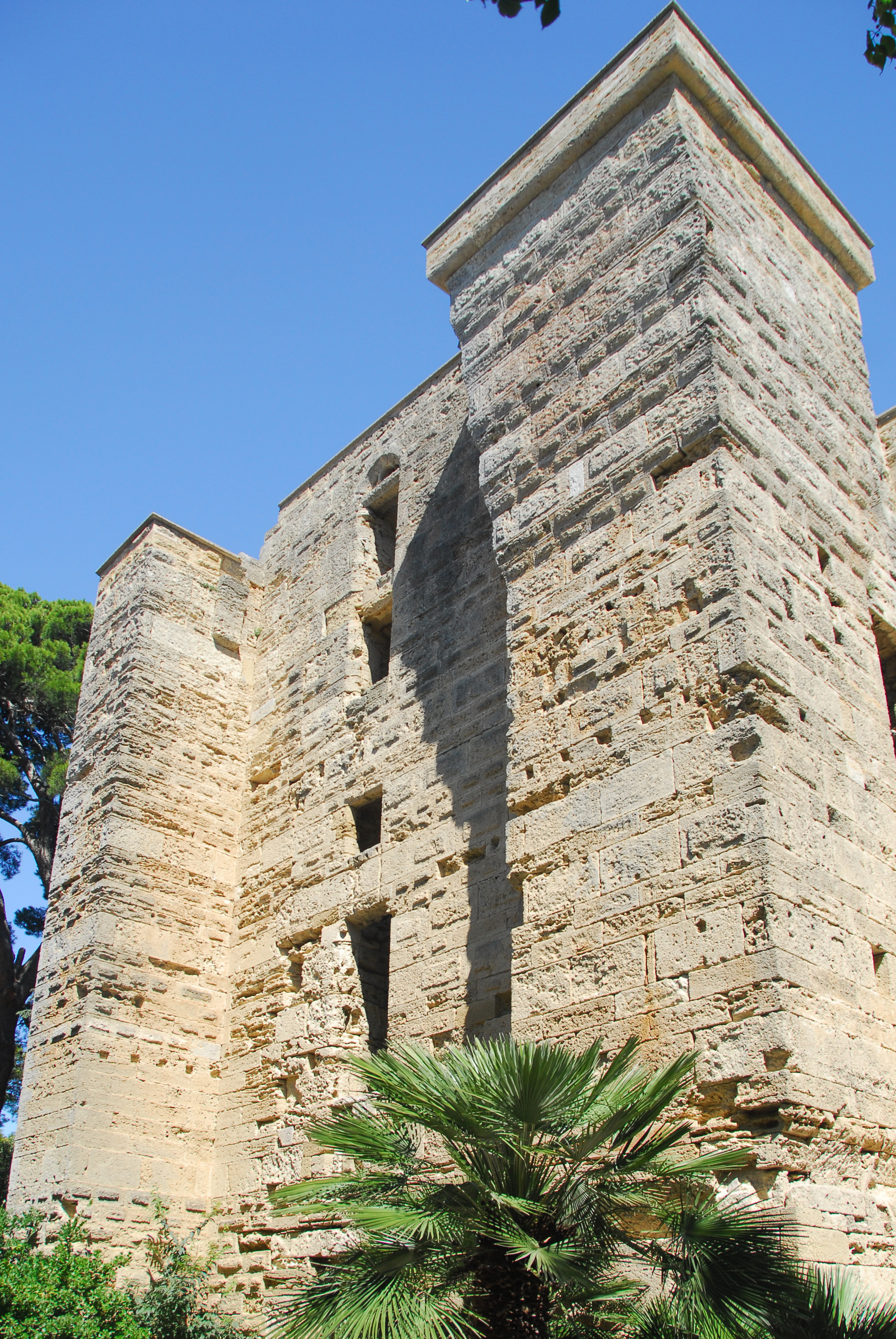 St-Pierre-et-St-Paul de Maguelone, Bischofsturm von SW